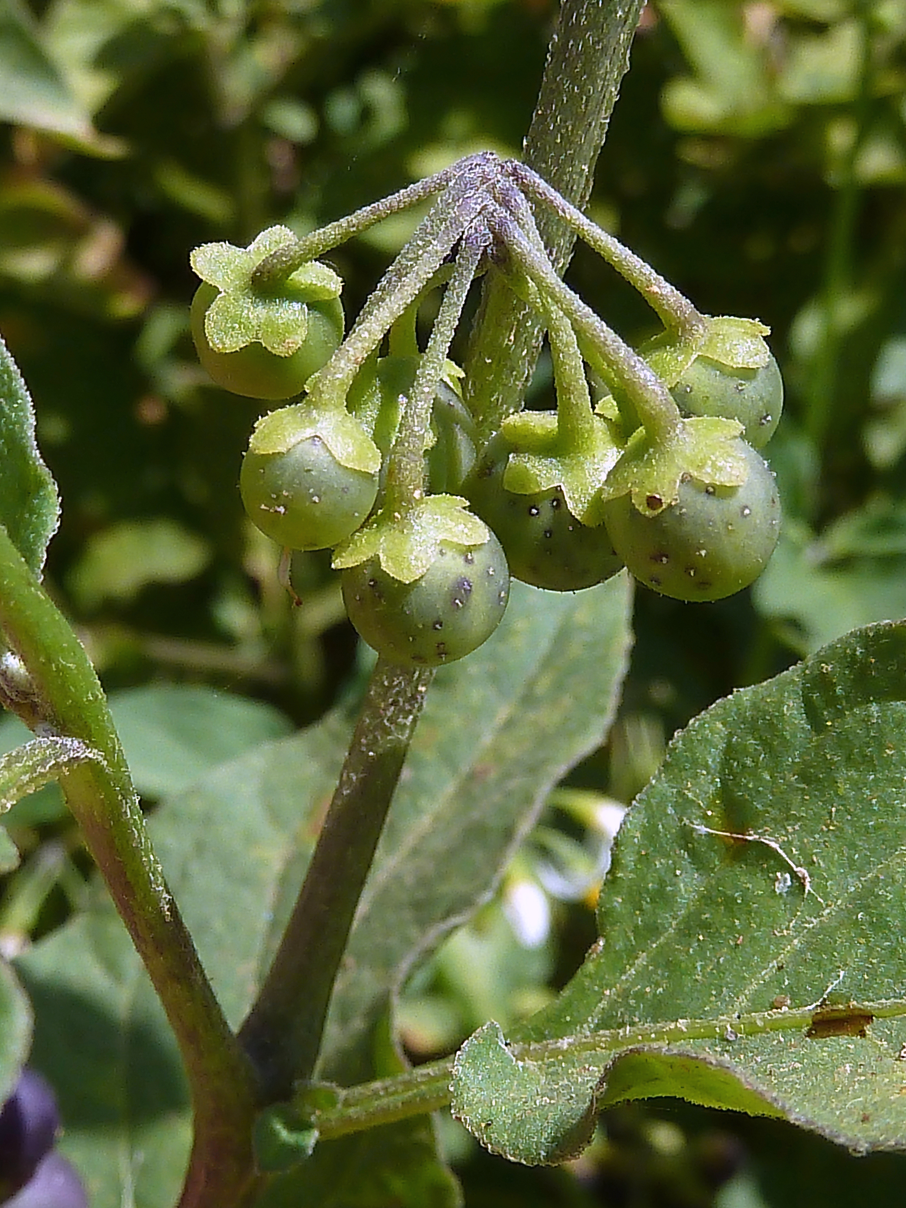 Solanum nigrum (Hierba mora) - Infrutescencia péndula con frutos inmaduros. - Playa de La Colonia, Águilas, Provincia de Murcia (España).